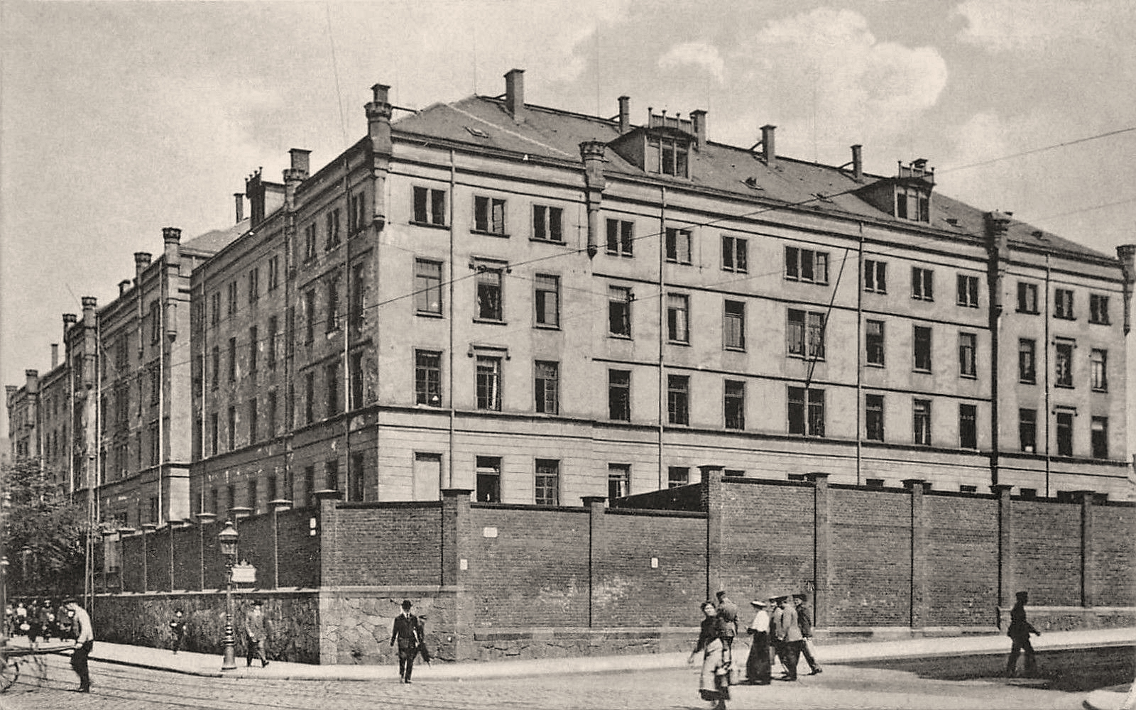 Kasserne des 104. Regiments am Bernsbachplatz in Chemnitz ca. 1910, im Volksmund: "Menschenfalle"; Ecke Reitbahnstraße / Ritterstraße